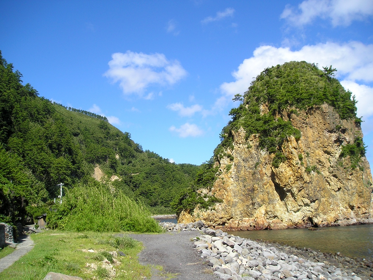 TATEGAMI & NEMACHI village Kuchi-Erabu Island.